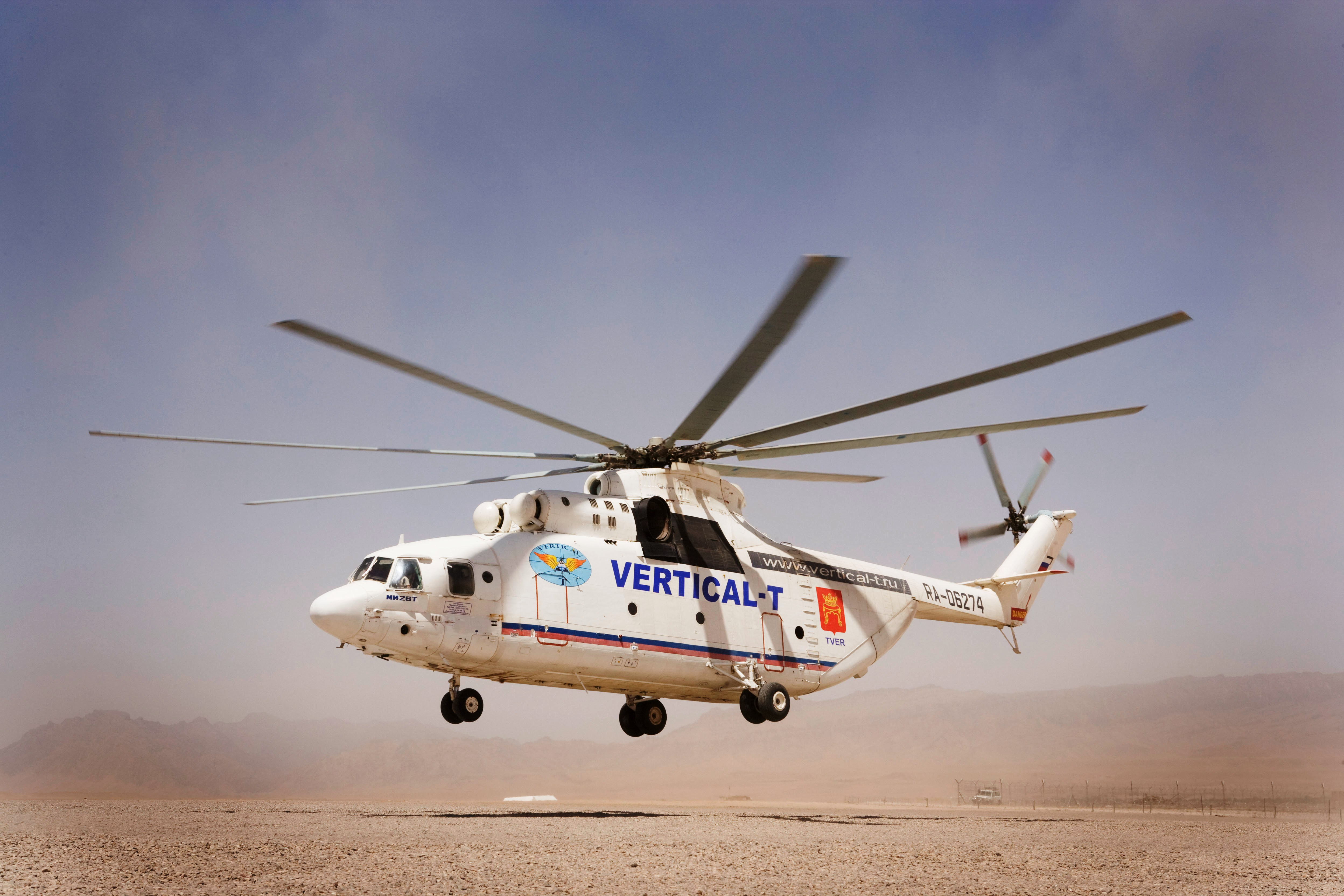 TFU Task Force Uruzgan: De HALO, ingehuurde transporthelikopter die vliegt voor de Nderlanders stijgt op vanaf de vliegstrip te Tarin Kowt.